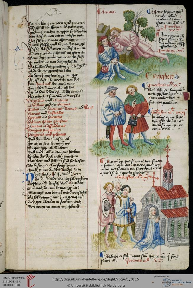 Hugo von Trimberg "Der Renner"